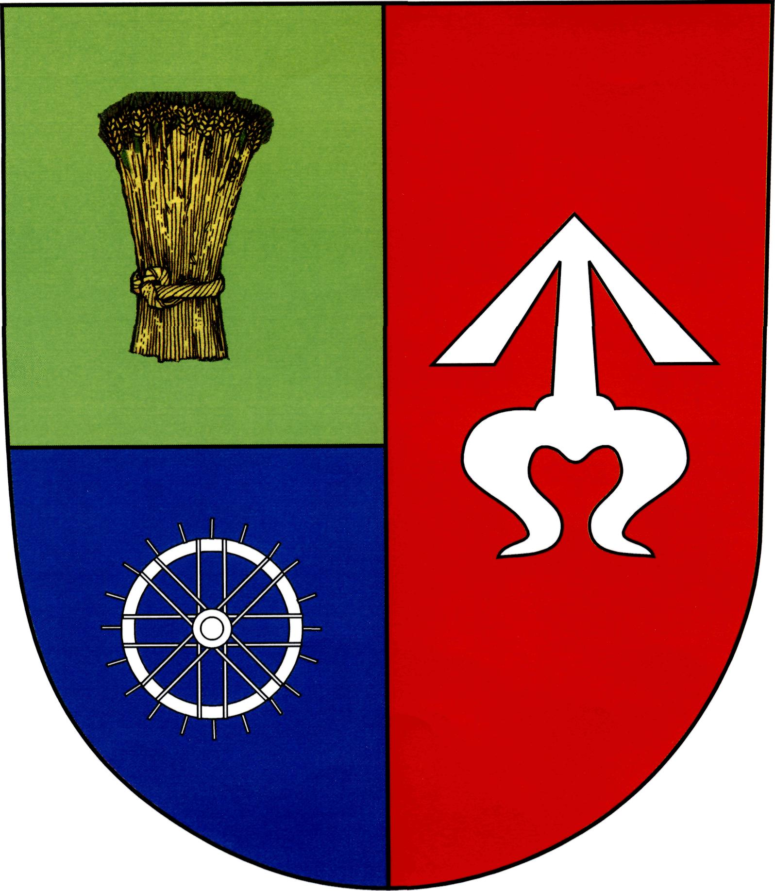 Znak obce Suchov